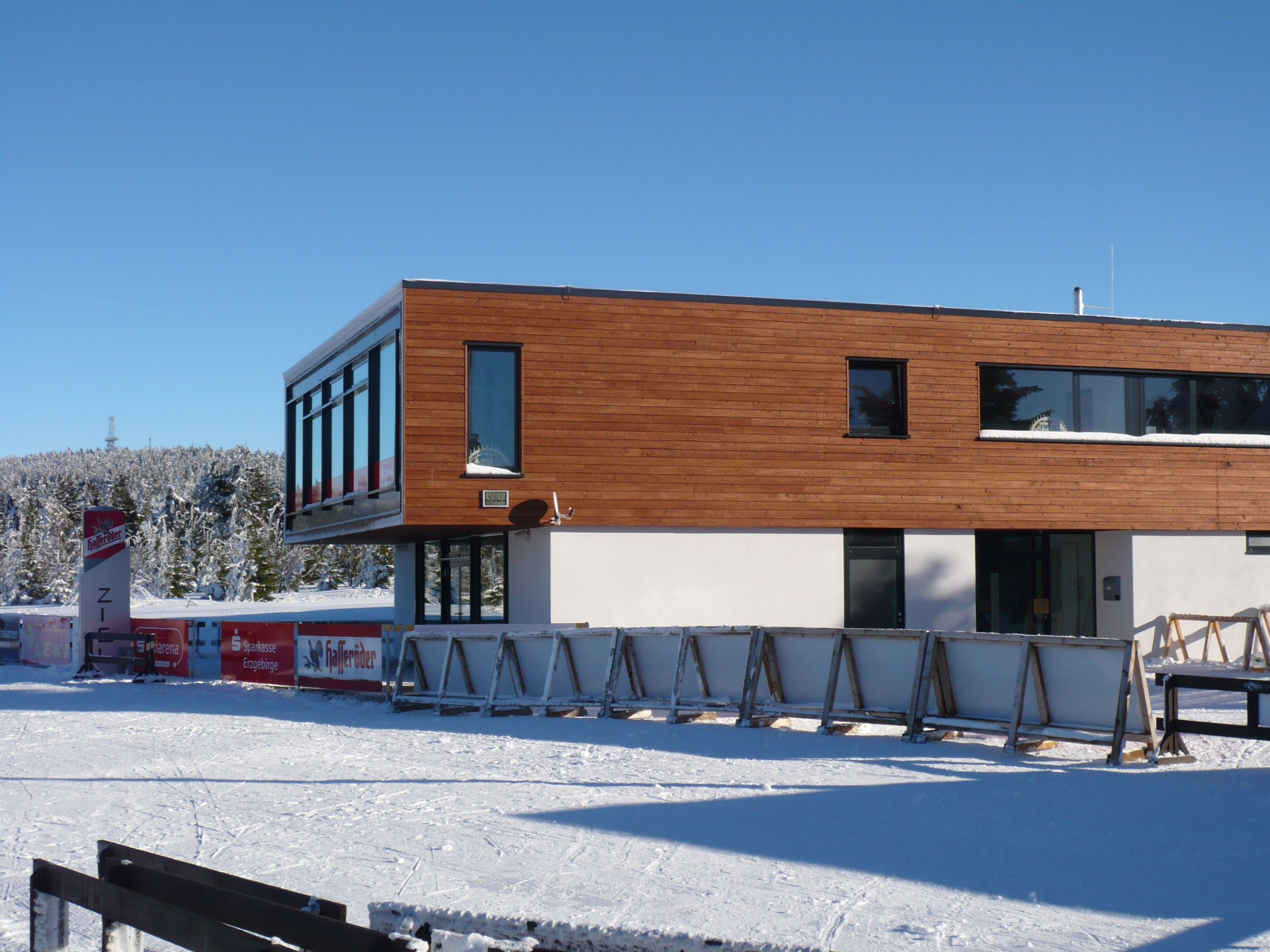 Sparkassen-Skiarena am Fichtelberg, Skilanglauf-Stadion des WSC Erzgebirge Oberwiesenthal